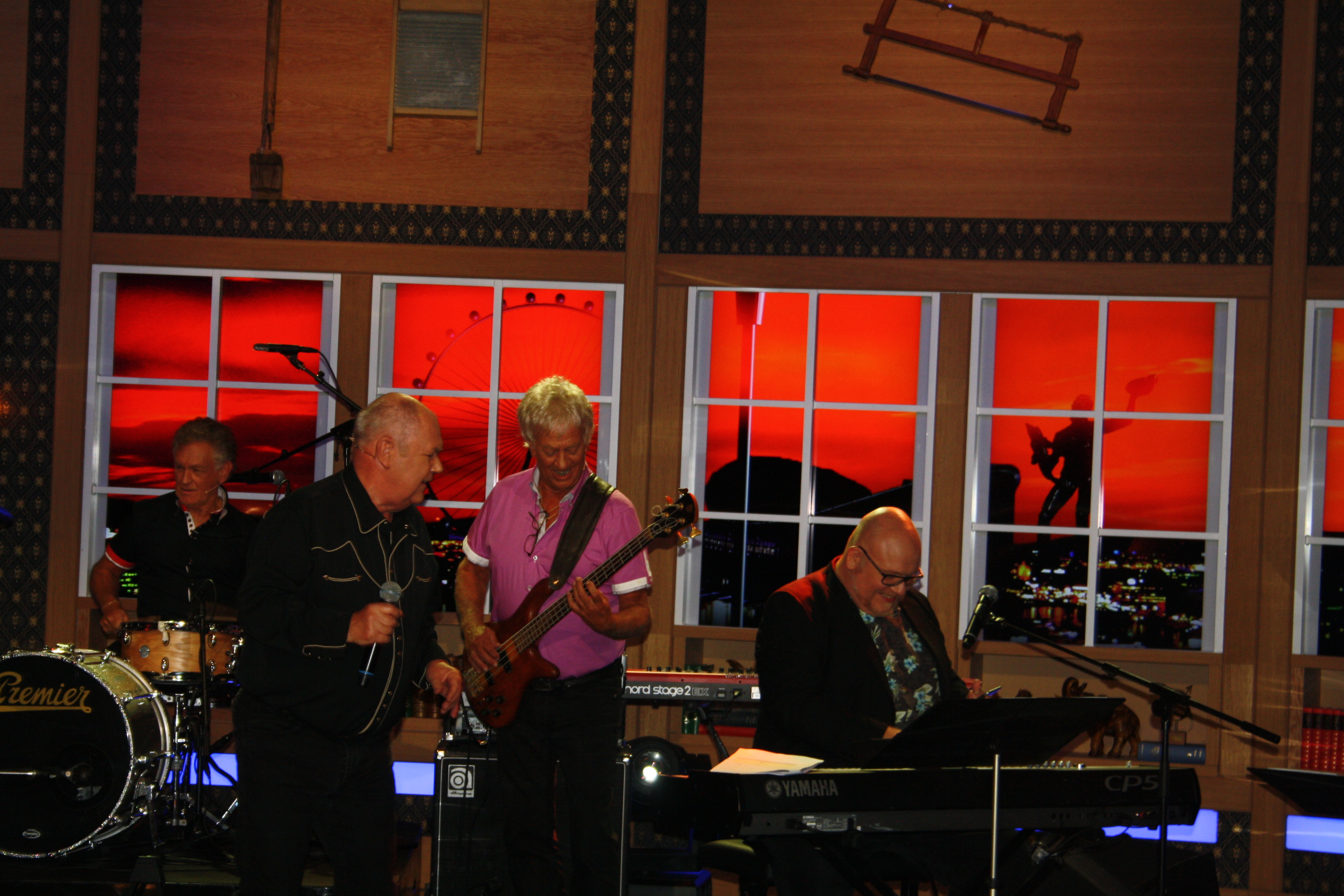 The Mule Skinner Band i Bingolotto